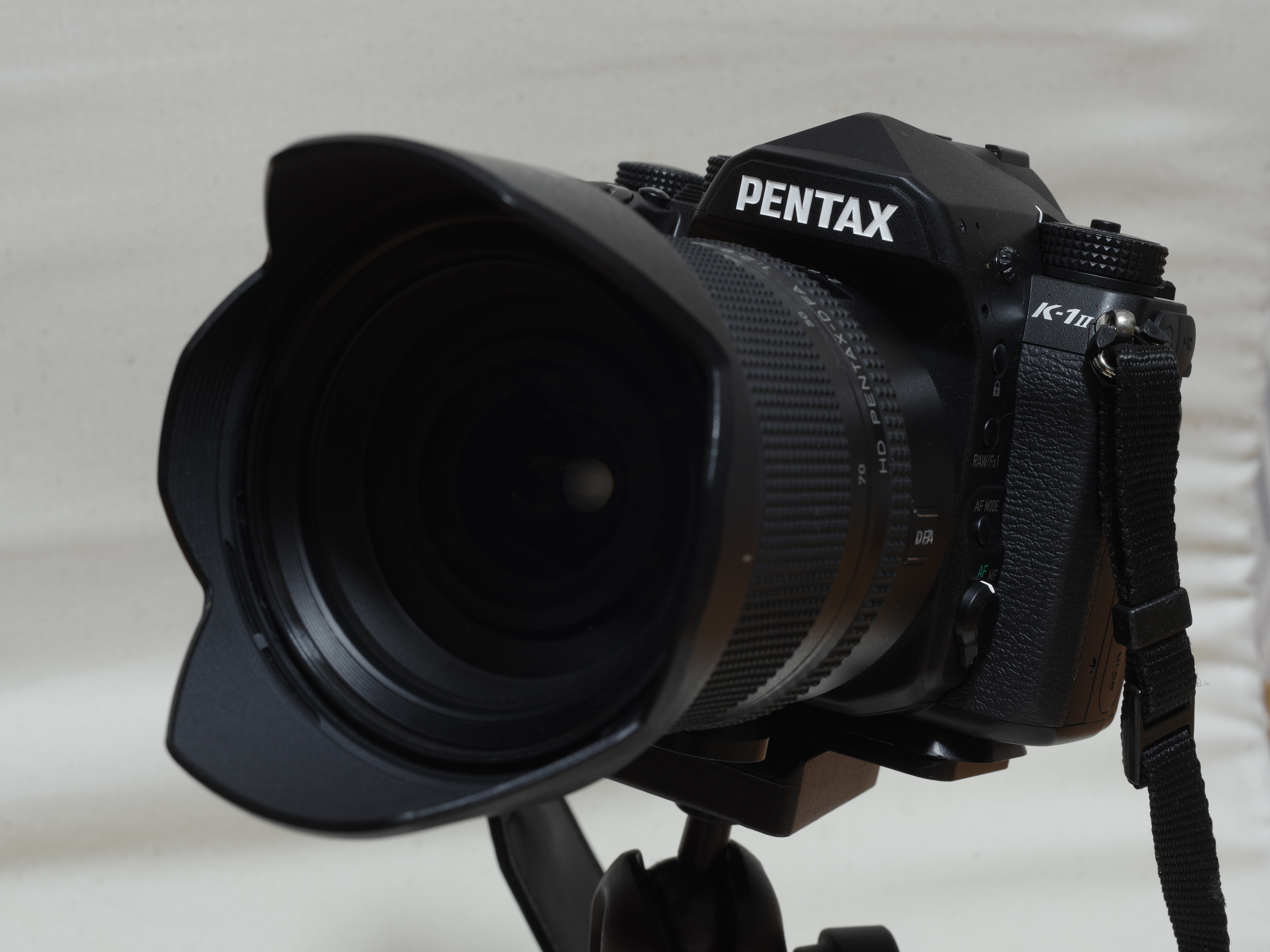 Pentax K-1 mkII